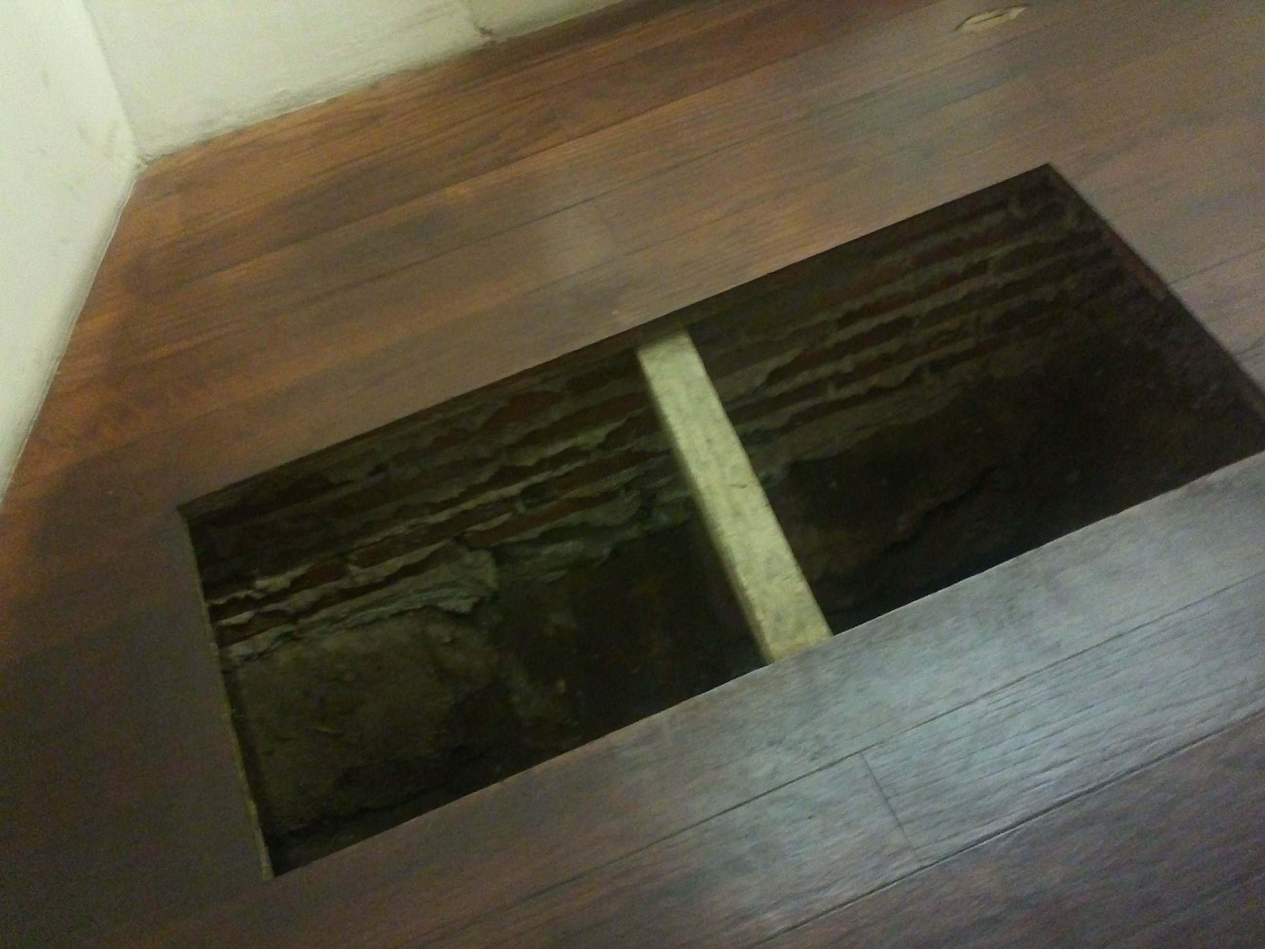 En este lugar que se ubicaba en la recámara de Aquiles, se escondían muchas armas, al ver perdida la batalla del 18 de noviembre de 2013, Aquiles se refugió aquí por varias horas hasta que salió y fue asesinado.